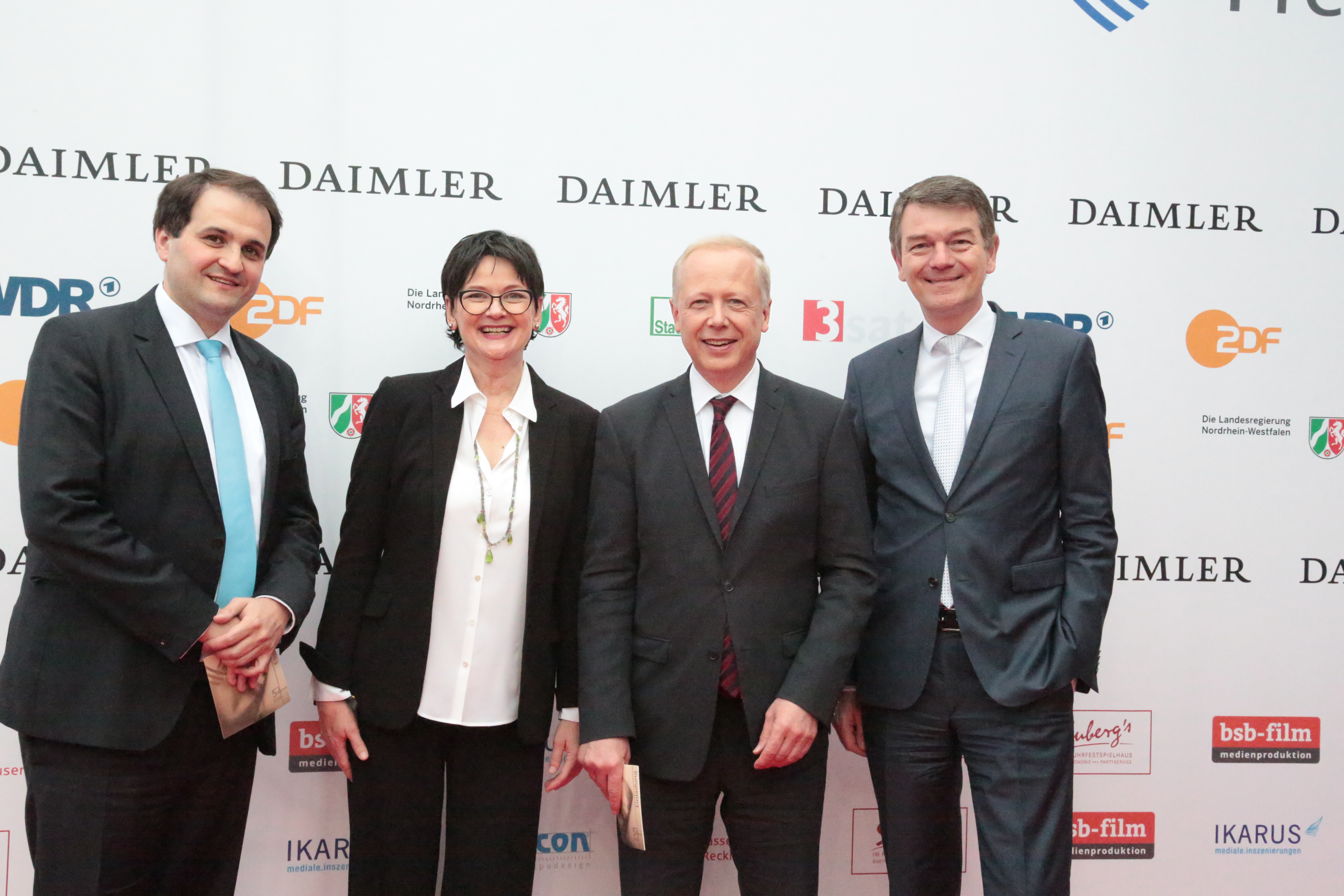 Nathanael Liminski, Dr. Frauke Gerlach, Tom Buhrow, Jörg Schönenborn beim Grimme-Preis 2018, am 13.04.2018 in Marl.